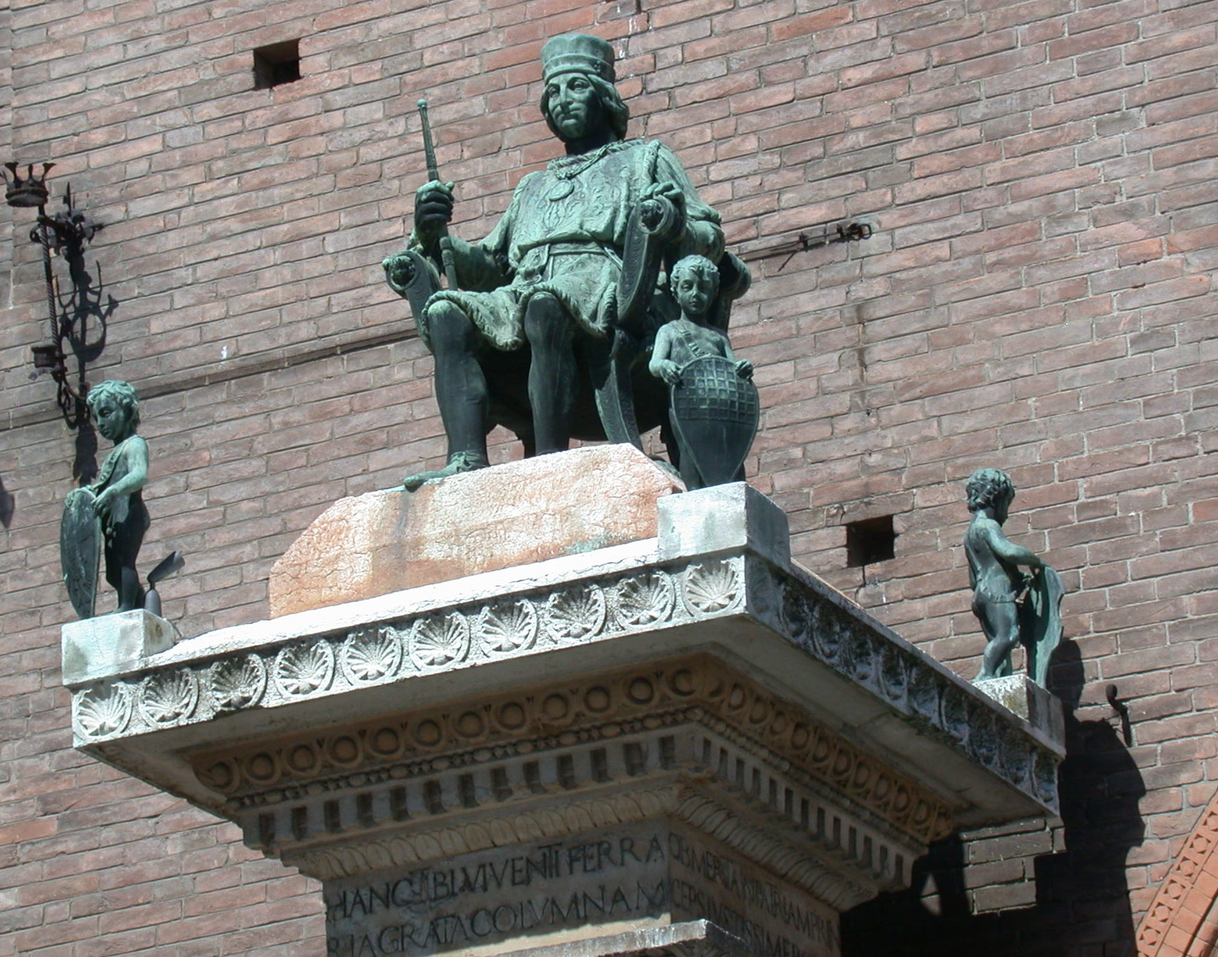 Copia novecentesca, collocata di fronte al Palazzo del Municipio di Ferrara, della statua di Borso d'Este.